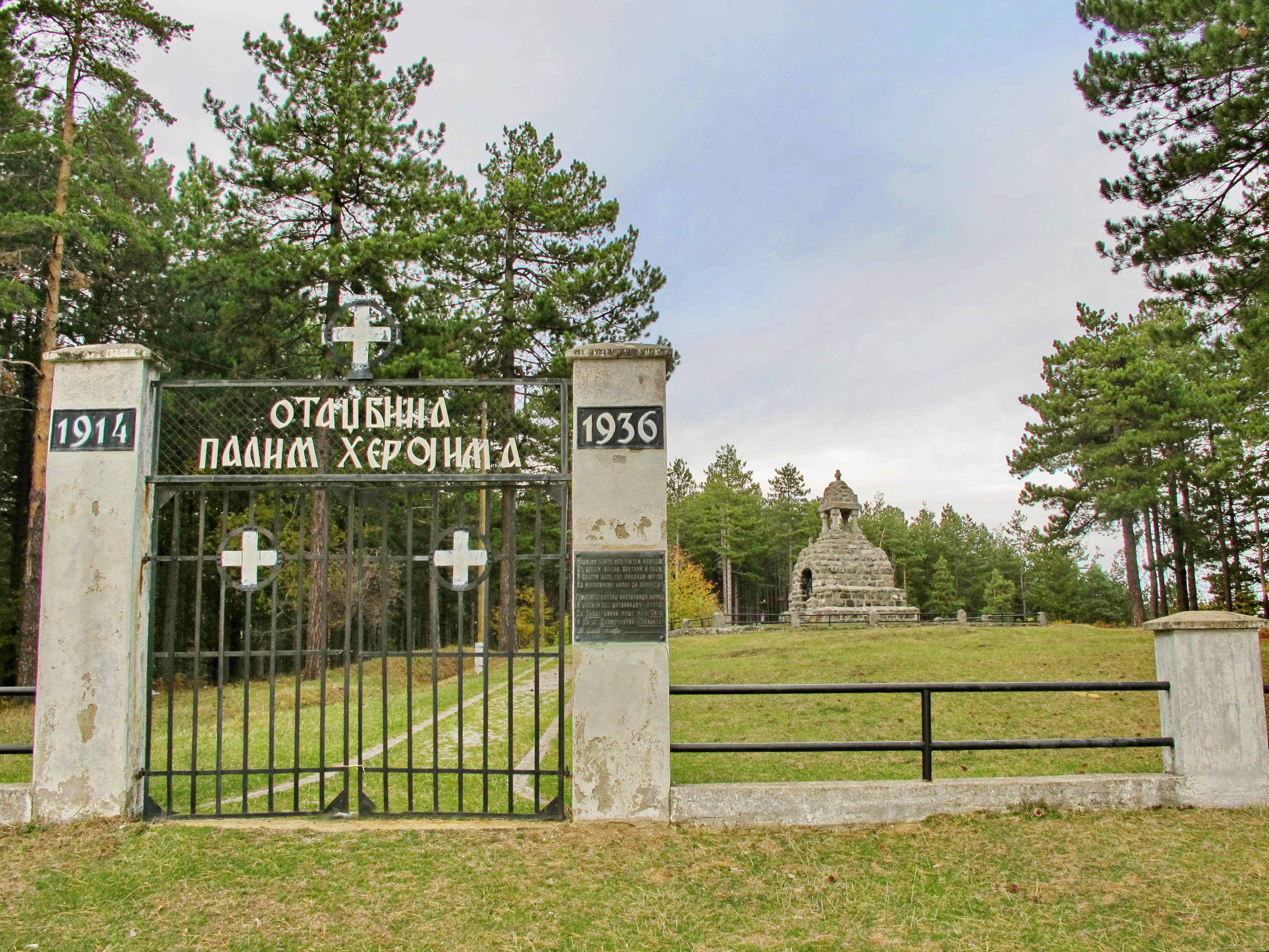 Spomenik vojnicima poginulim tokom bitke na Mačkovom kamenu, na planini Azbukovica, Zapadna Srbija. Bitka se odigrala na početku Prvog svetskog rata, krajem septembra 1914. godine.